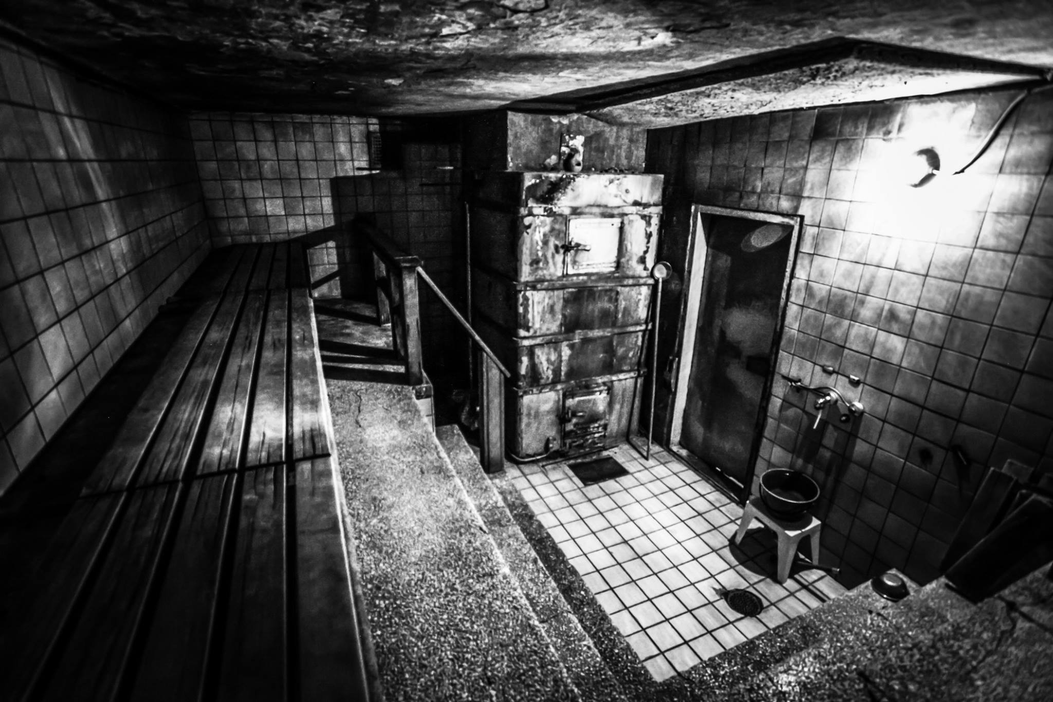 Kuva: Kimmo Virta